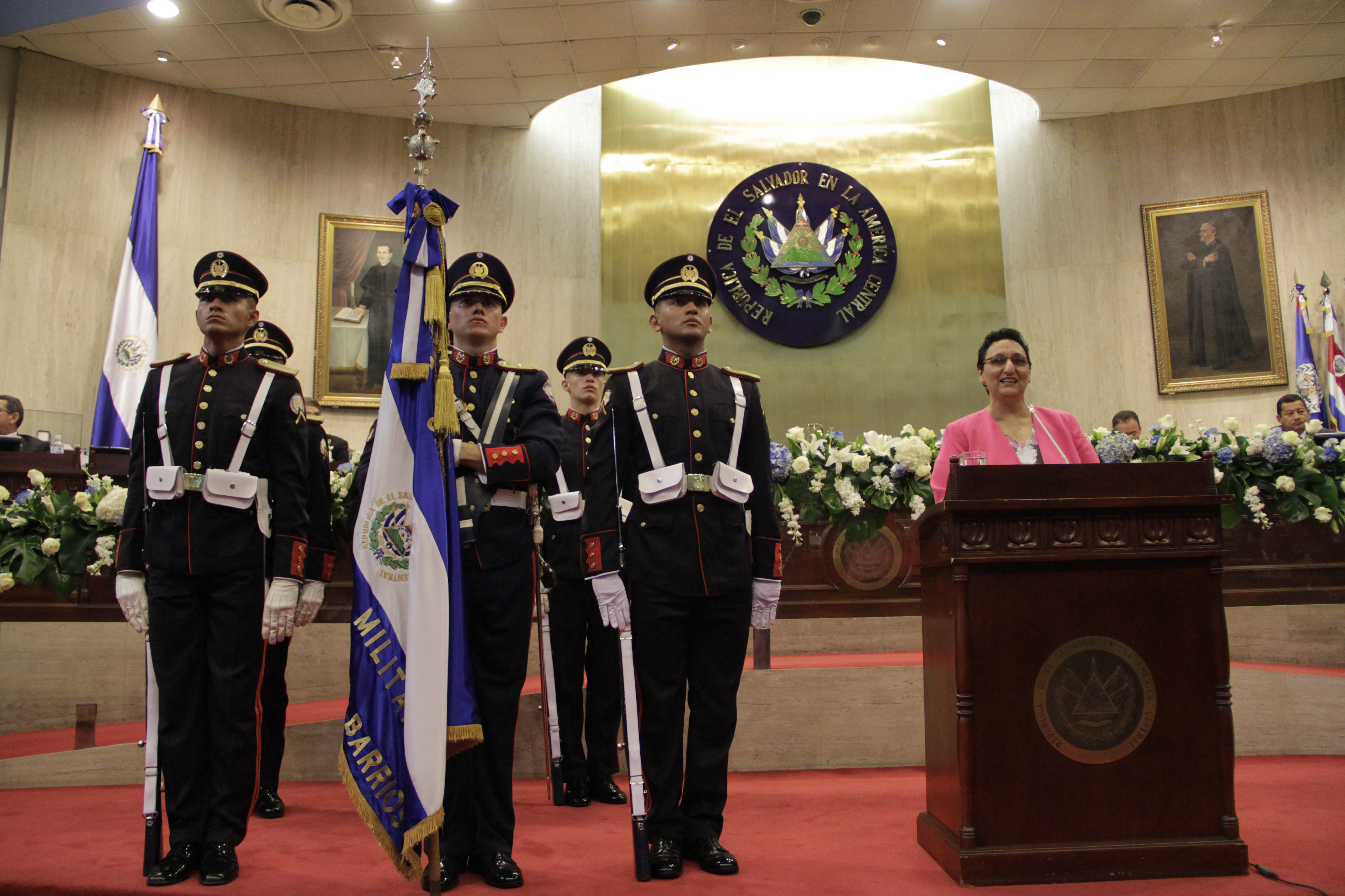 Loreña Peña, Presidente de la Asamblea Legislativa, durante su discurso en la sesion solemne de la Legislatura 2015-2018.